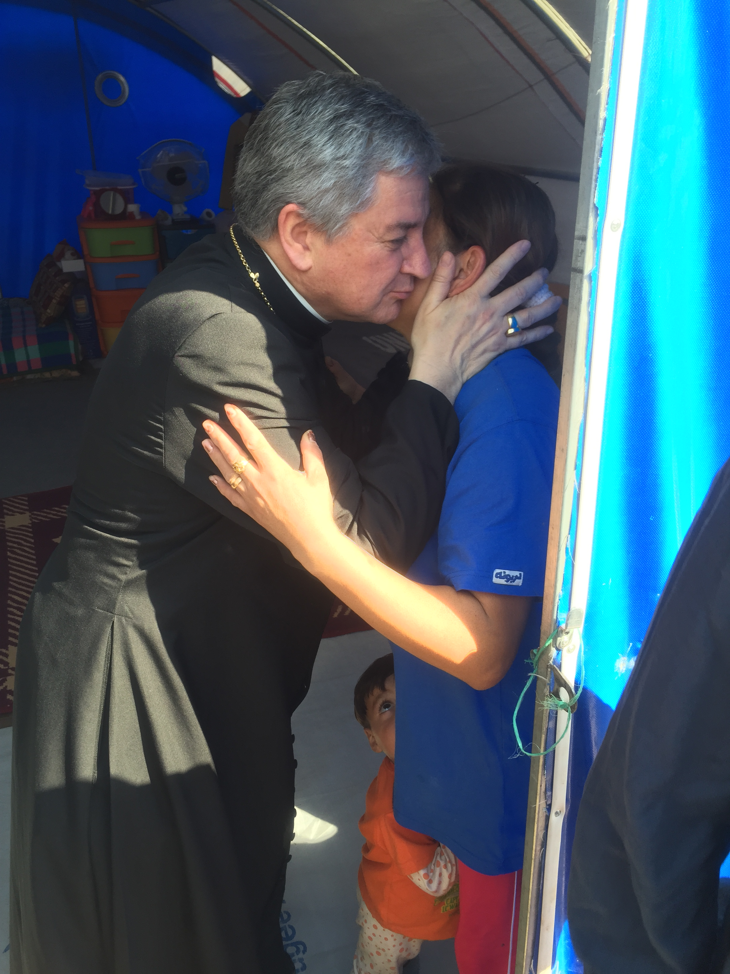 Mgr Aillet en visite dans un camp de réfugiés chrétiens irakiens, à Erbil (région autonome du Kurdistan d'Irak), en octobre 2014 au cours des exactions commises par les membres de l'Etat Islamique en Irak.